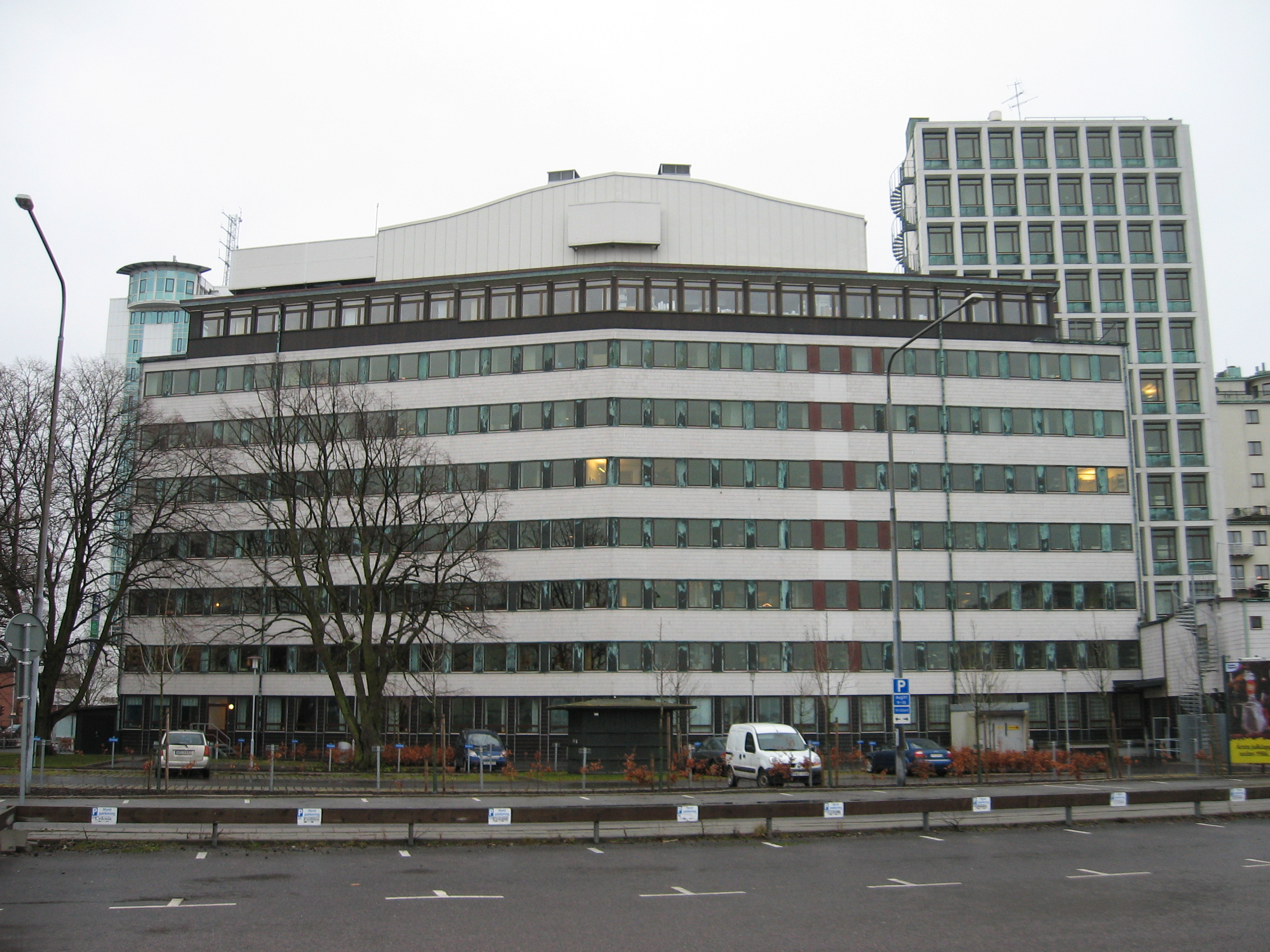 Bylgiahuset i Malmö